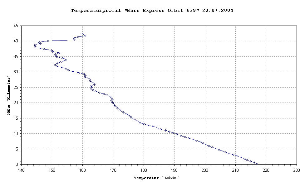 Temperaturprofil